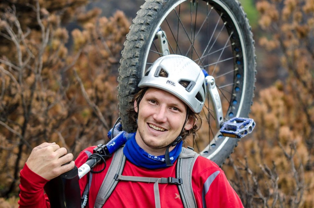 Einradfaher David Weichenberger mit seinem Muni